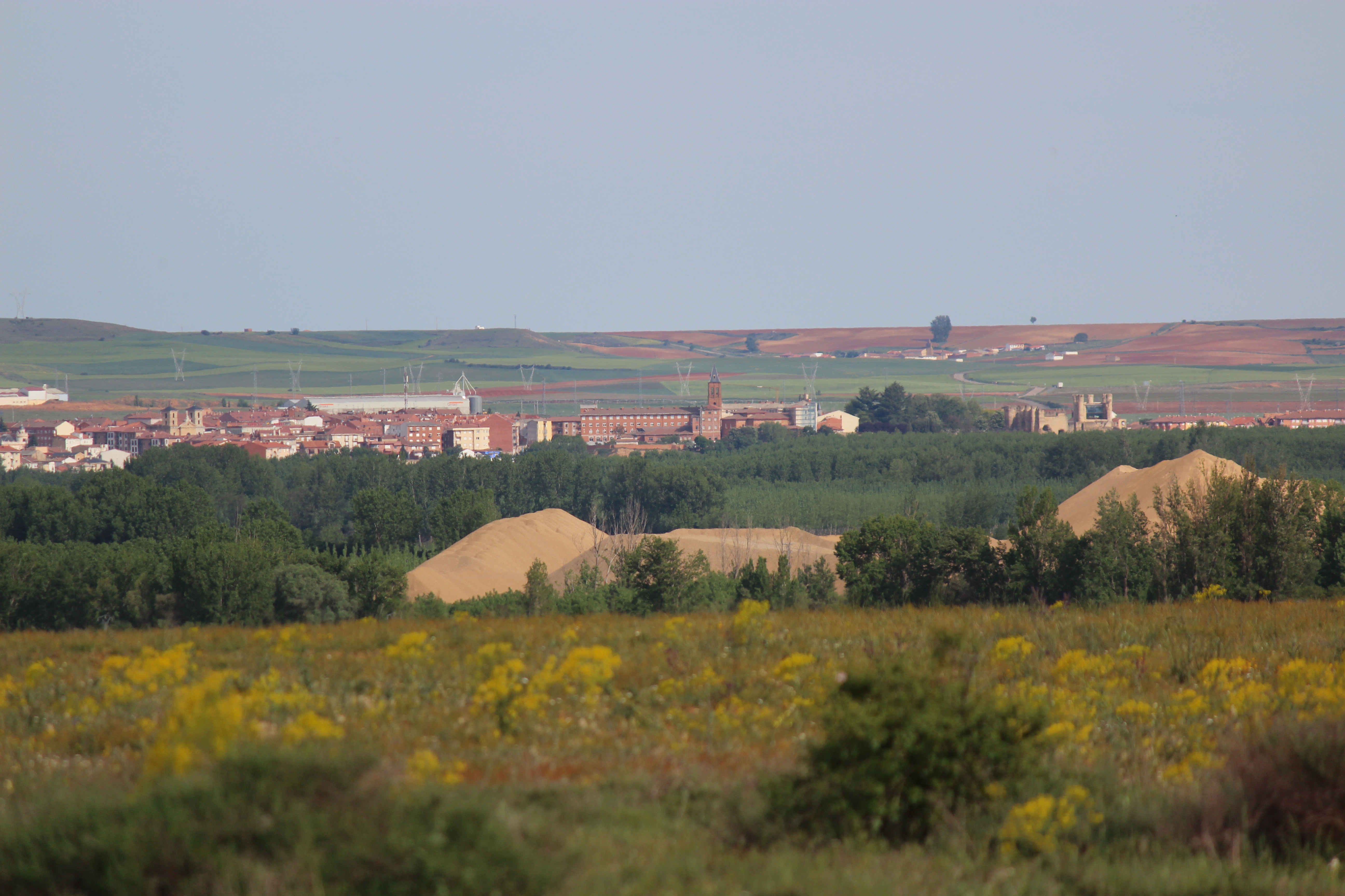 Valencia de Don Juan desde lo alto del cuesto de Villamañán (León).